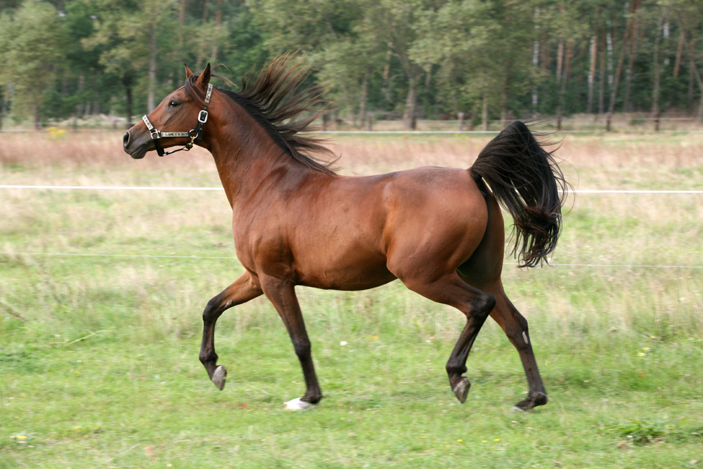 Arabisches Vollblut(Pernod Al Ariba OX) im Trab mit typischer, hoher Schweifhaltung